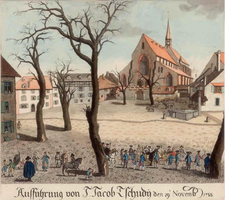 Barfüsserplatz; Hinrichtungszug des J. Jacob Tschudy. 1788, aquarellierte Radierung. Colorierte Lithographie